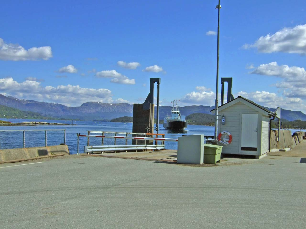 Fure ferjekai (Riksveg 61) ved Dalsfjorden i Sunnfjord